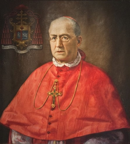 Retrato del cardenal español Eustaquio Ilundain y Esteban (1862-1937), que llegó a ser obispo de Orense y arzobispo de Sevilla.